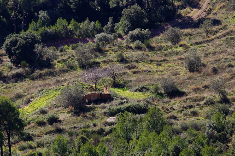 Ruïnes de Can Carbassot als Cingles de Bertí-Serralada prelitoral. l'Ametlla del Vallès-Montmany-Bigues (Vallès Oriental, Catalunya)